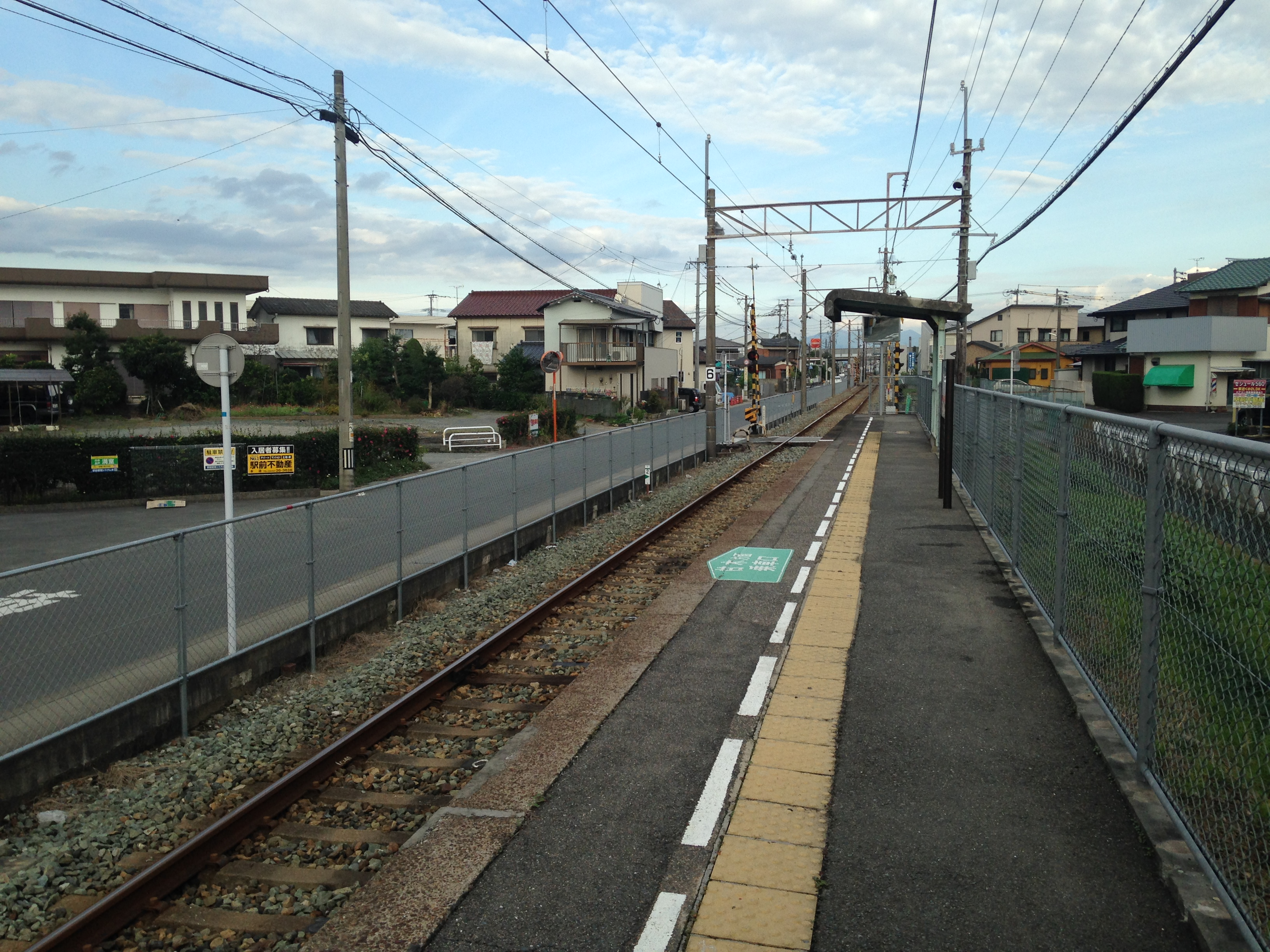 五郎丸駅のホーム(奥は学校前方面)